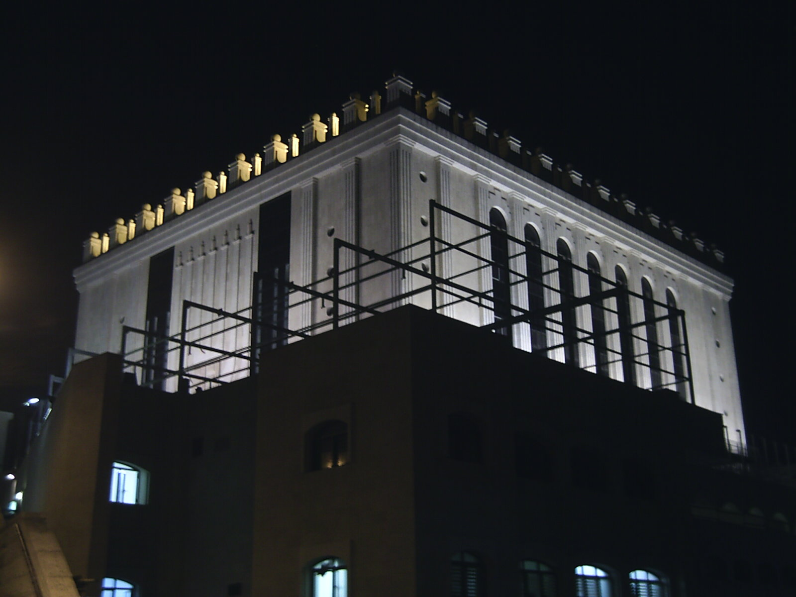 Beis Midrash van de Belzer chassidim in Jeruzalem. Belzer hoofdkantoor in Jeruzalem. Zelf gemaakt.